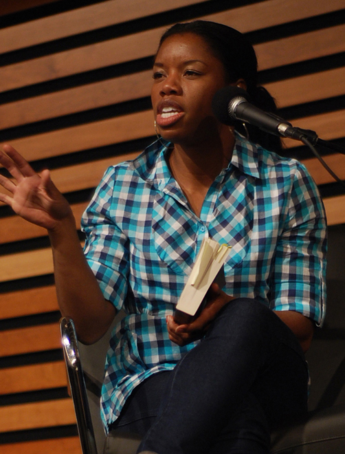 Perdita Felicien at Toronto Celebrates Canada Reads.